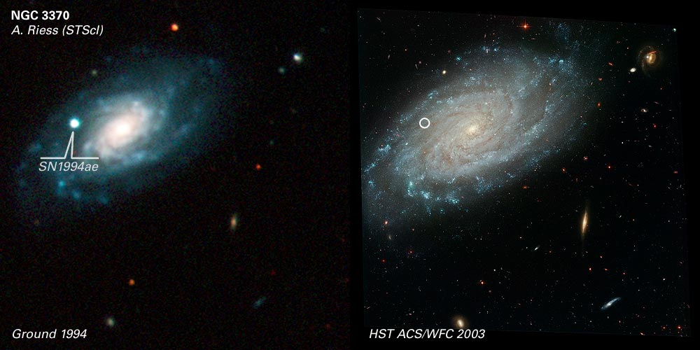 NGC 3370